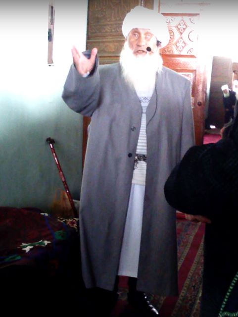 Тоҷикӣ: Эшони Аллома Регарӣ